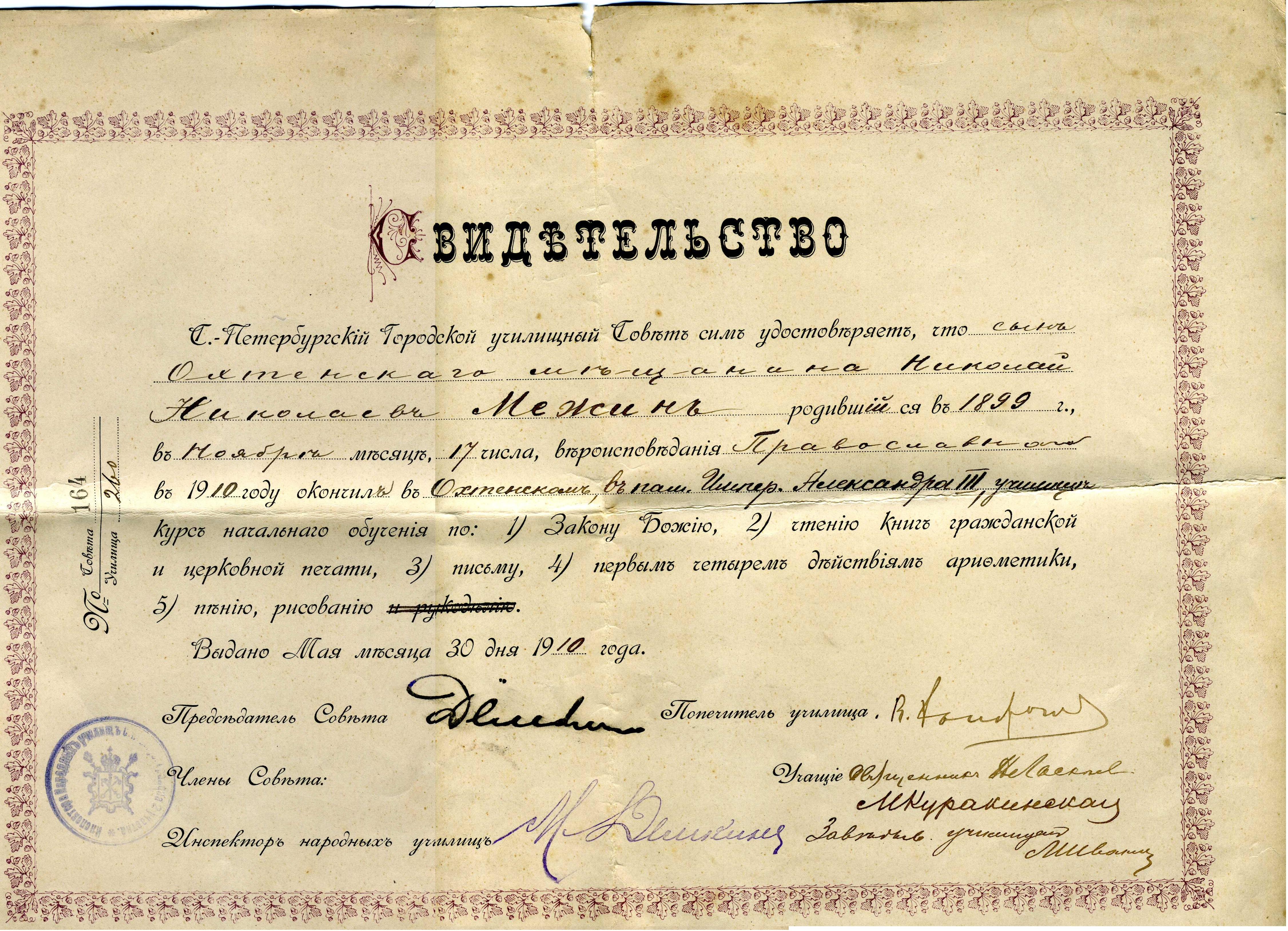 Свидетельство окончания Охтенского училища. Документ семейного архива Межиных